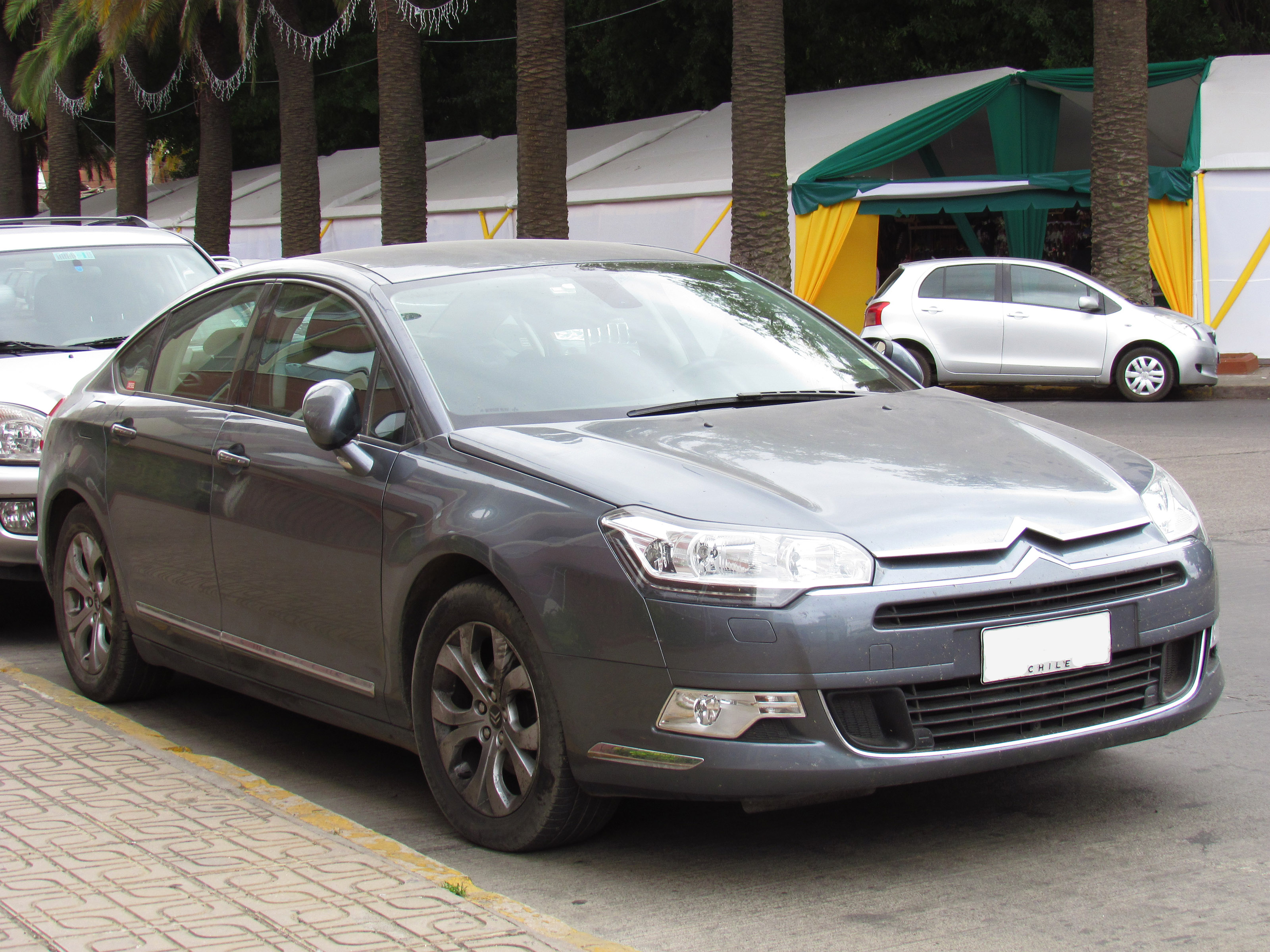 Citroen C5 2.0 HDi 2011